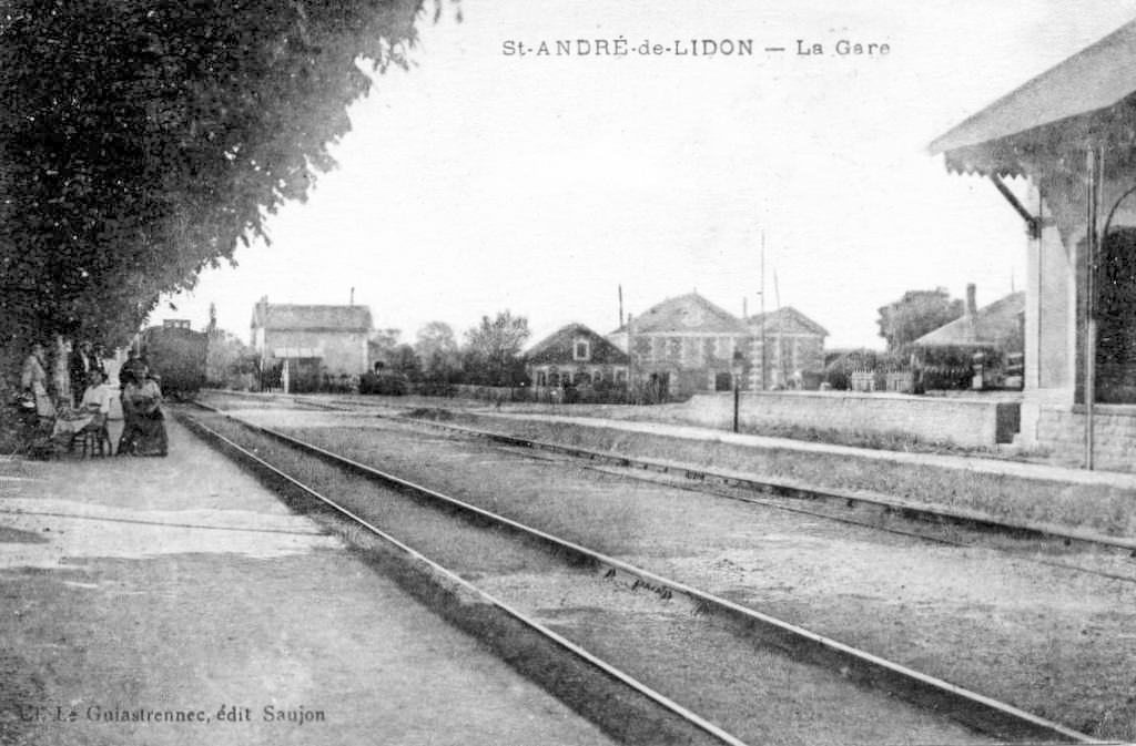 Au premier plan deux quais, deux voies et à droite la halle à marchandises et un quai découvert. En arrière plan le bâtiment du passage à niveau.